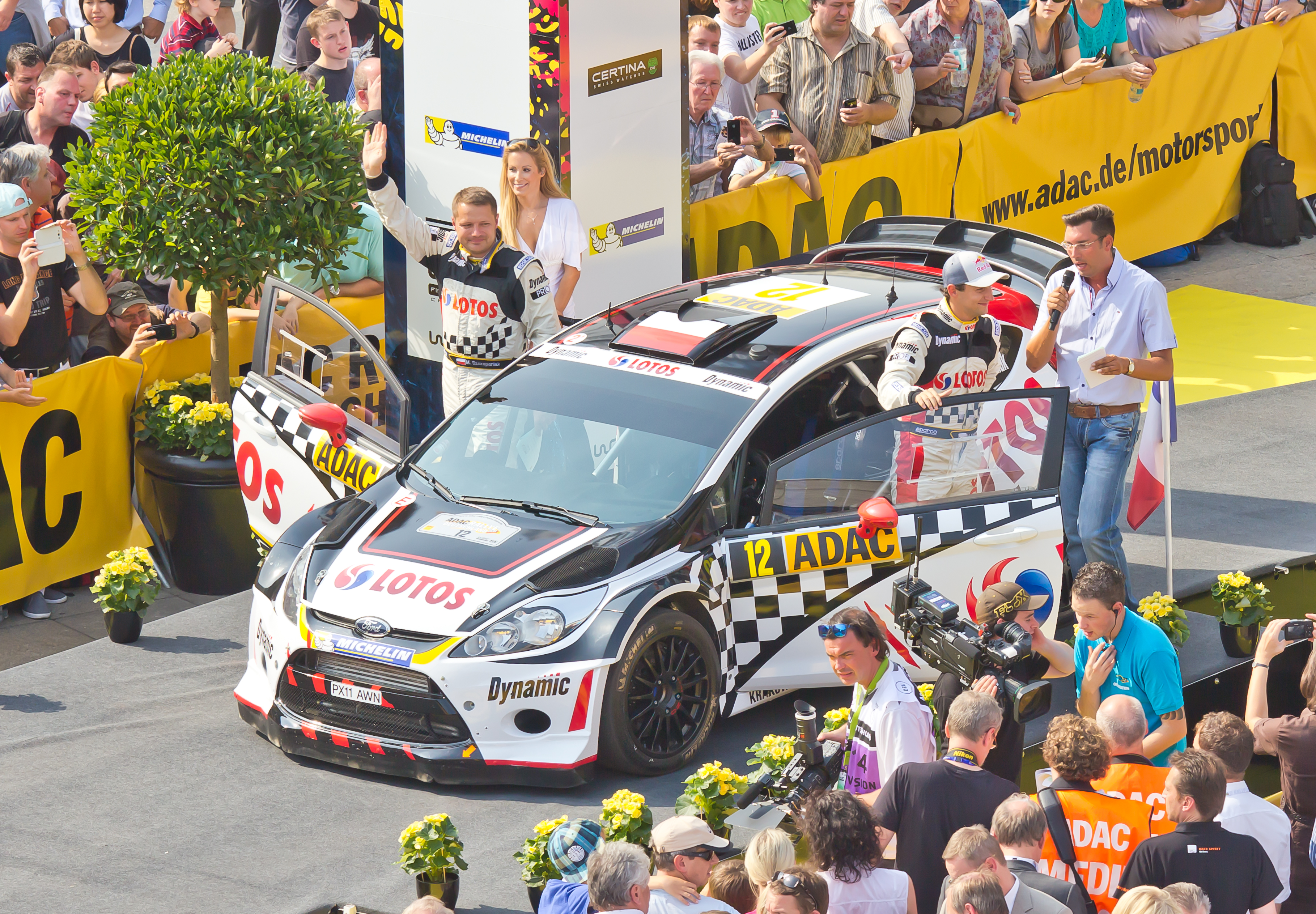 ADAC Rallye Deutschland 2013 - Fahrerpräsentation auf dem Roncalliplatz: Lotos Team WRC mit dem Fahrer Michał Kościuszko und Co-Fahrerin Maciek Szczepaniak im Ford Fiesta RS WRC